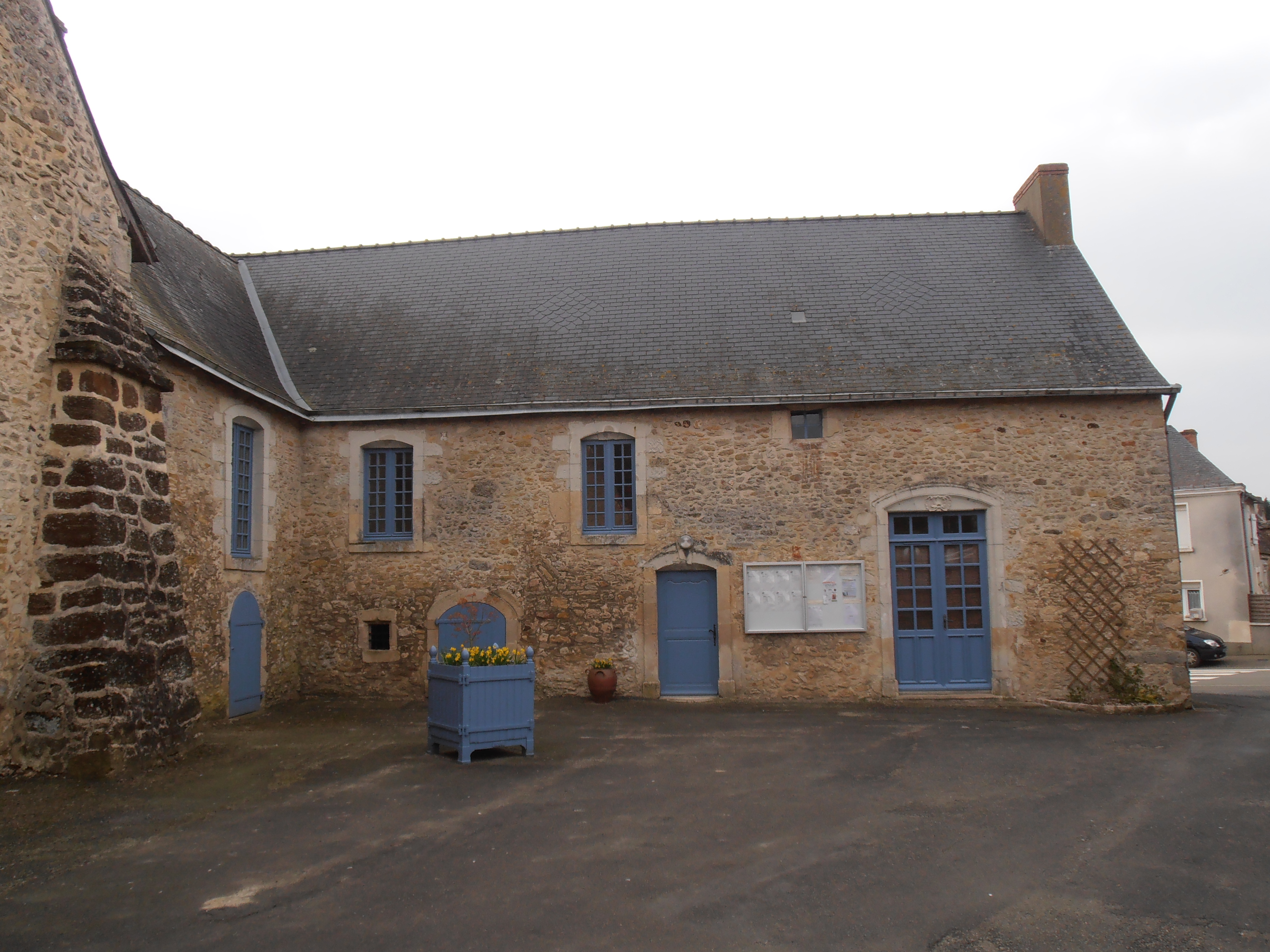 La mairie de Tassé